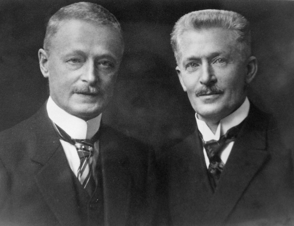 Die Brüder Dr. Hermann Simon (Arzt) und Alexander Simon (Ingenieur)